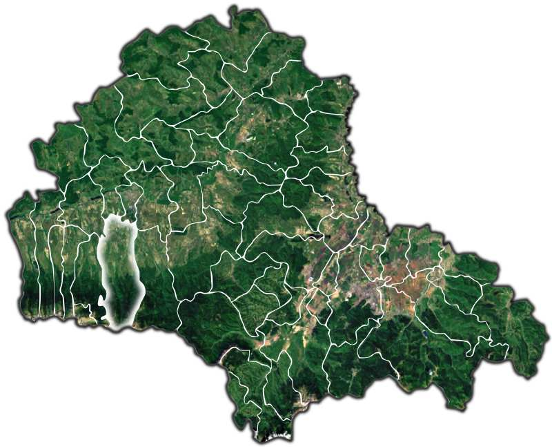 Recea jud Brasov